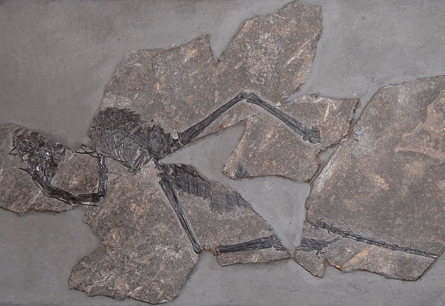 Museo civico di scienze naturali di Bergamo